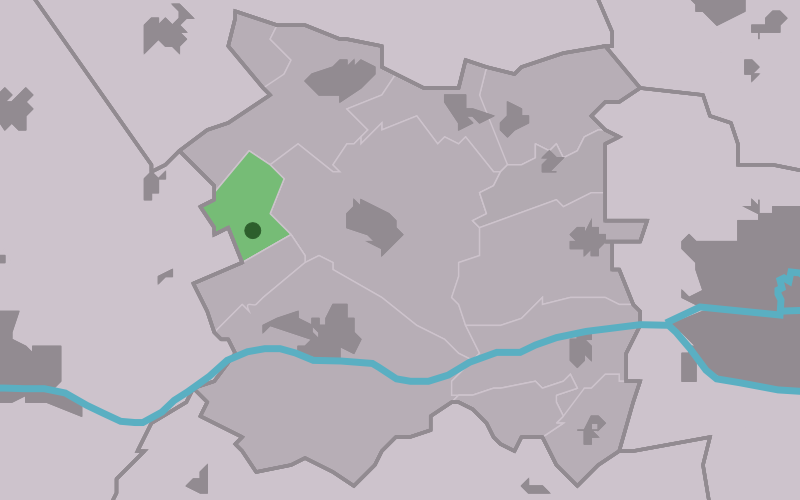 Kaartsje fan himrik fan Slappeterp